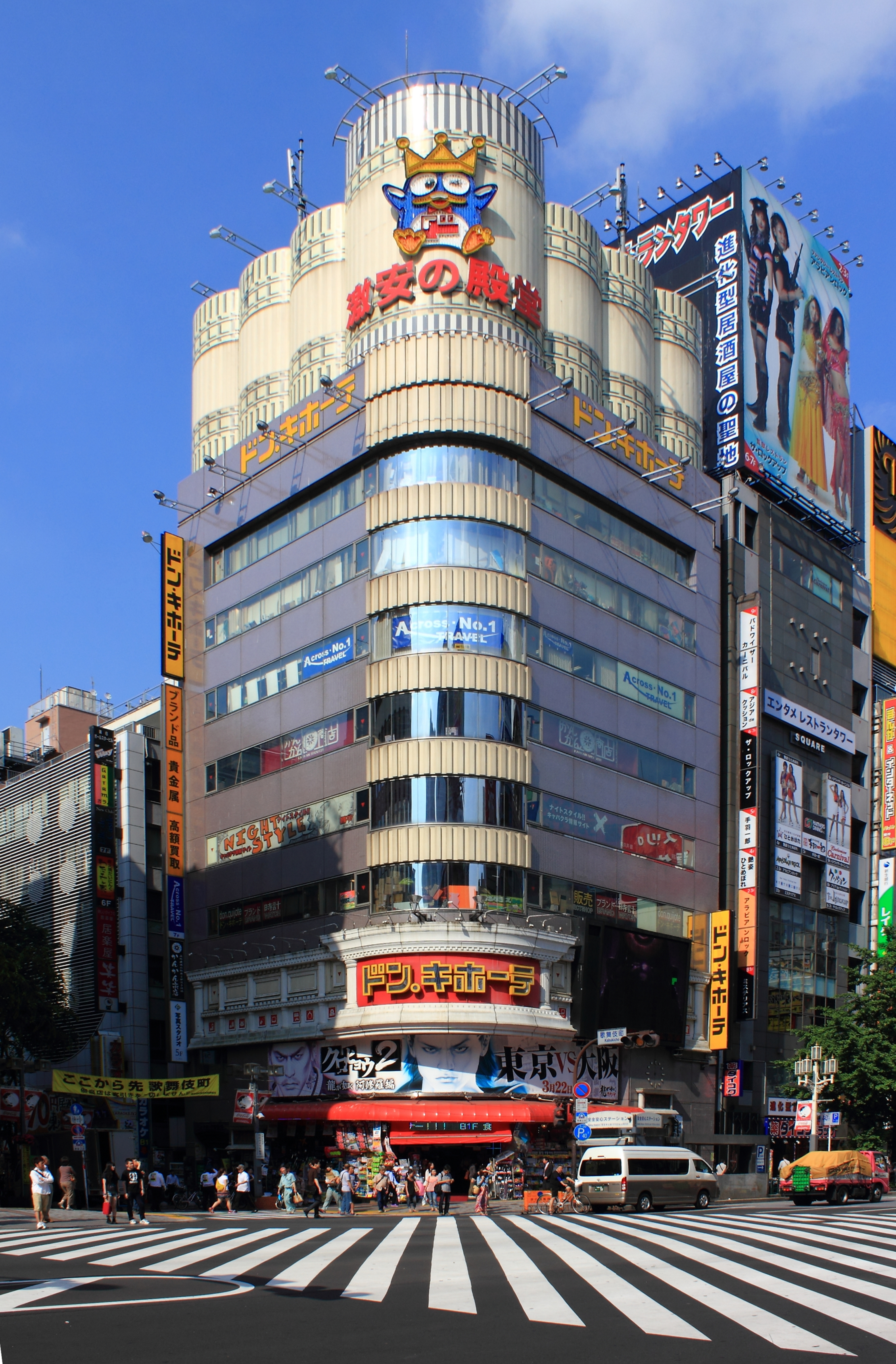 ドン・キホーテ新宿店